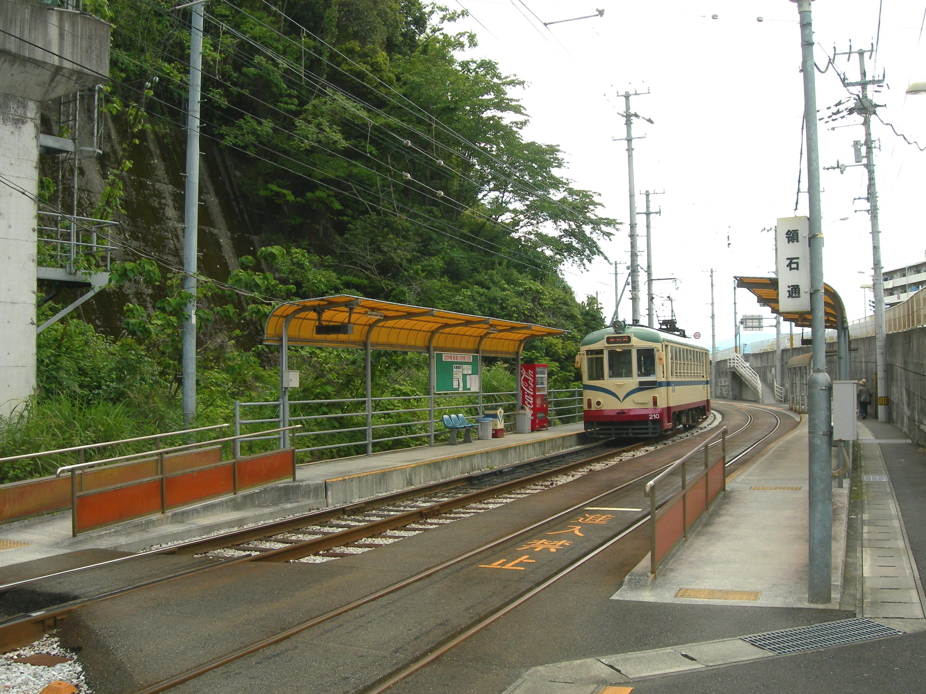 土佐電気鉄道・領石通電停。